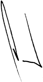 Роспись премьер-министра Украины Арсения Яценюка